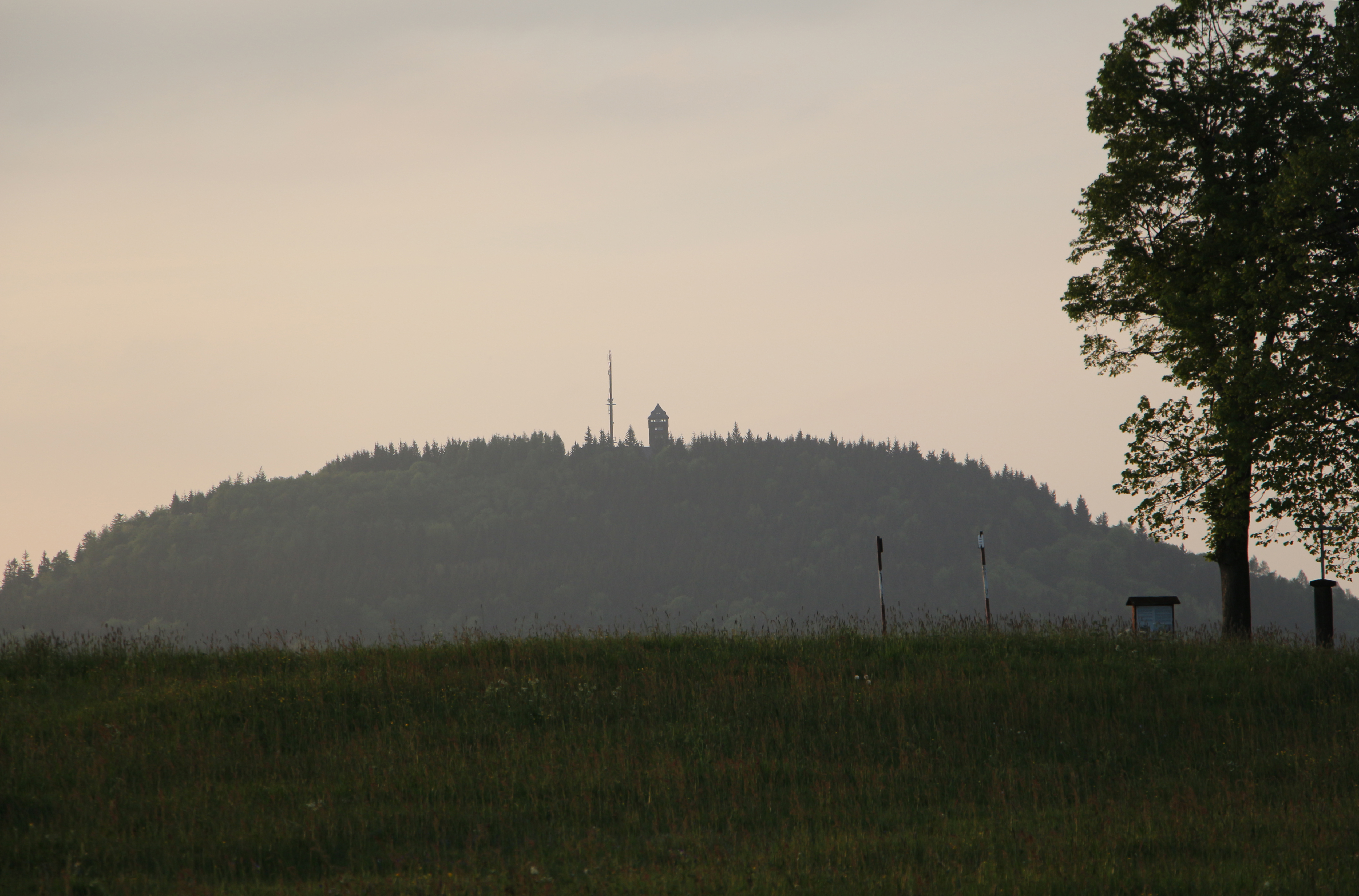 Berg Bärenstein von der tschechischen Seite her gesehen